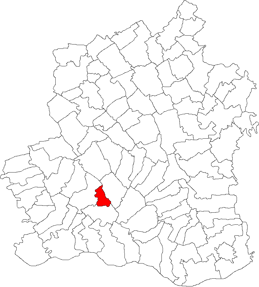 Categorie:Hărţi ale judeţului Teleorman